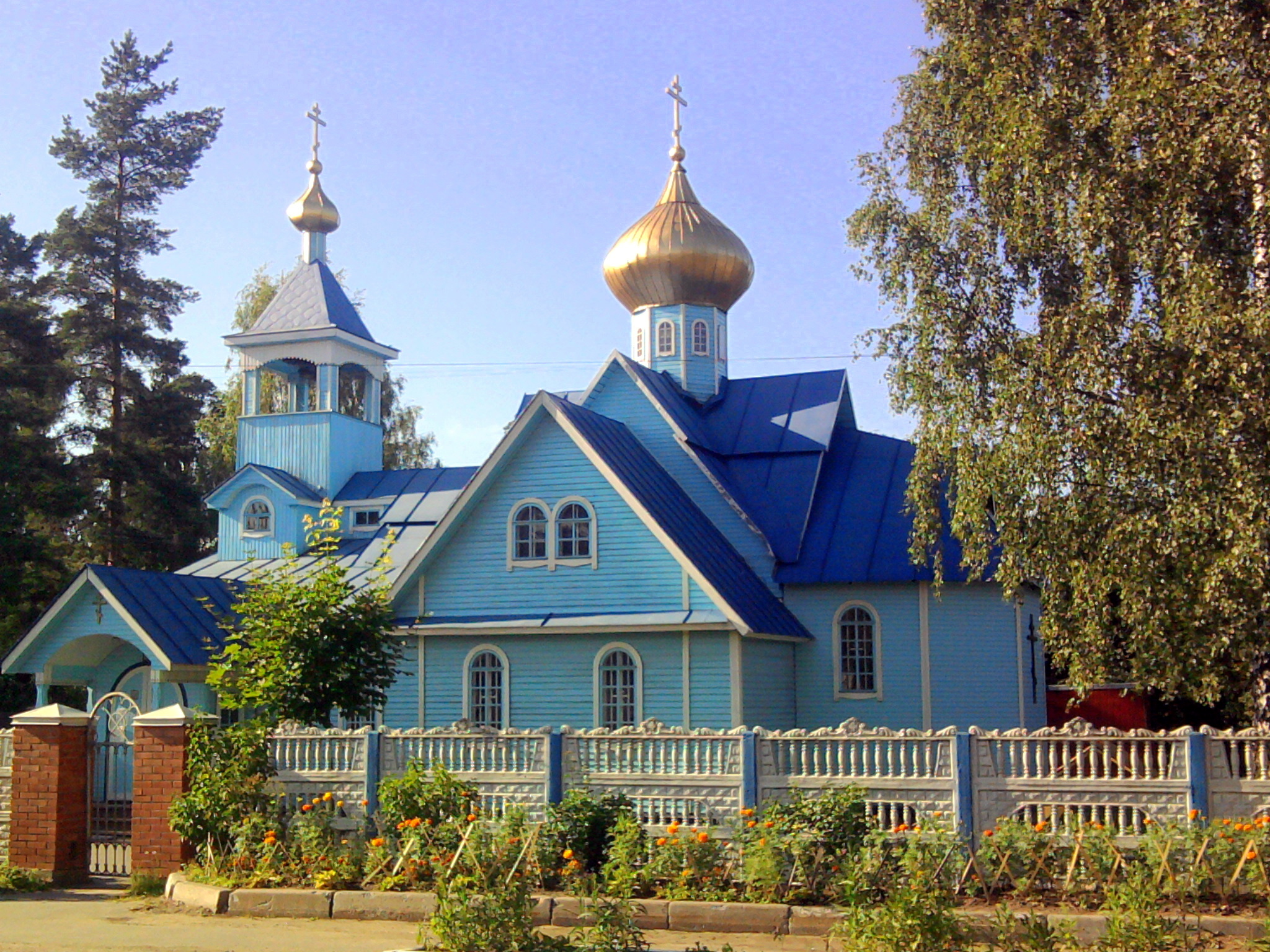 Храм Святых равноапостольных Константина и Елены в г. Всеволожске.